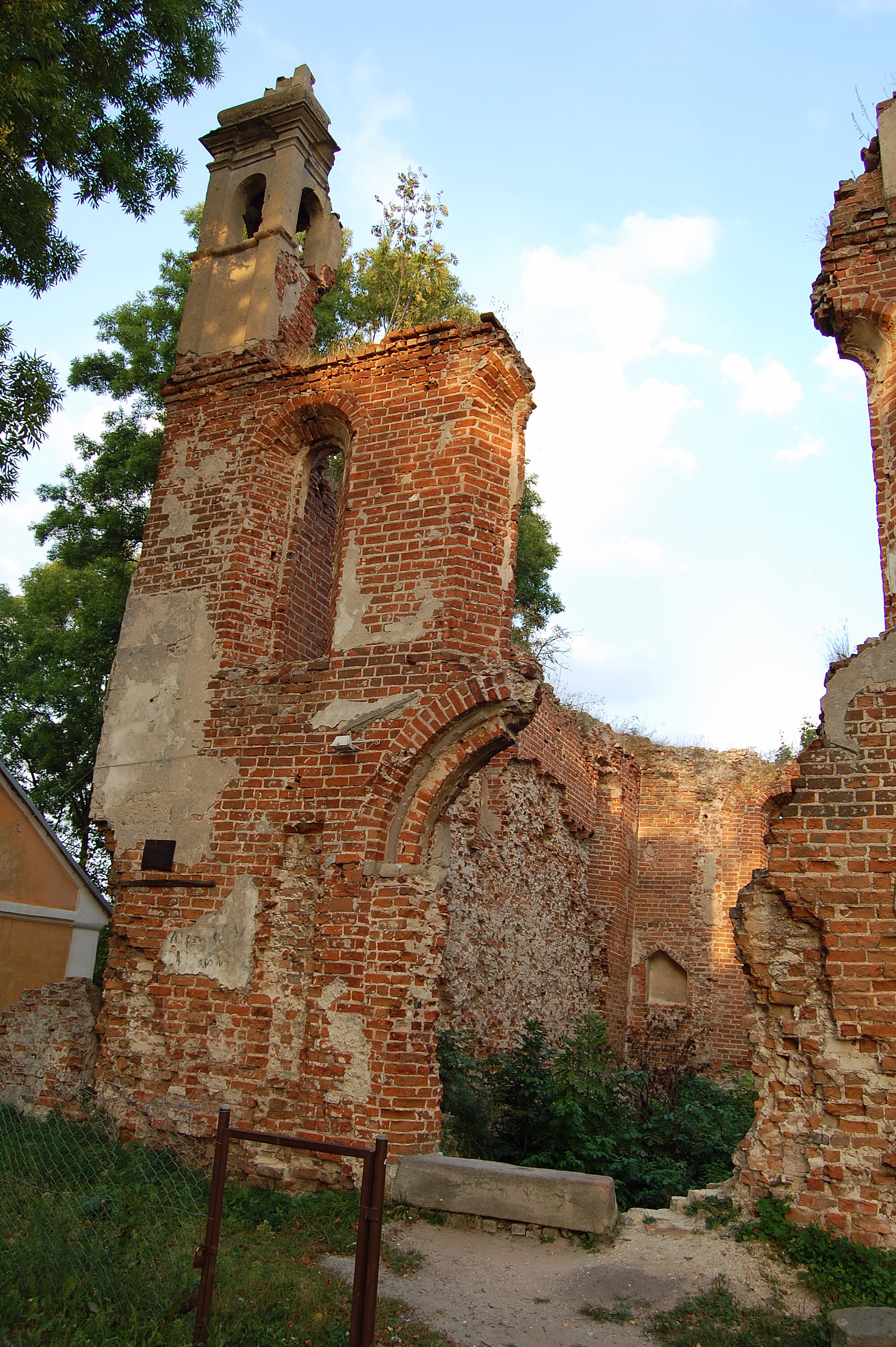 Ruiny katolickiego kościoła parafialnego pw. Trójcy Św.